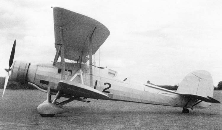 Der Prototyp Fairey G.1/34